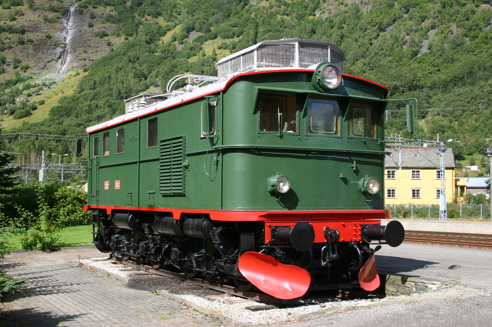 El-Lokomotive El 9.2063 als Denkmallok in Flam 13.08.05